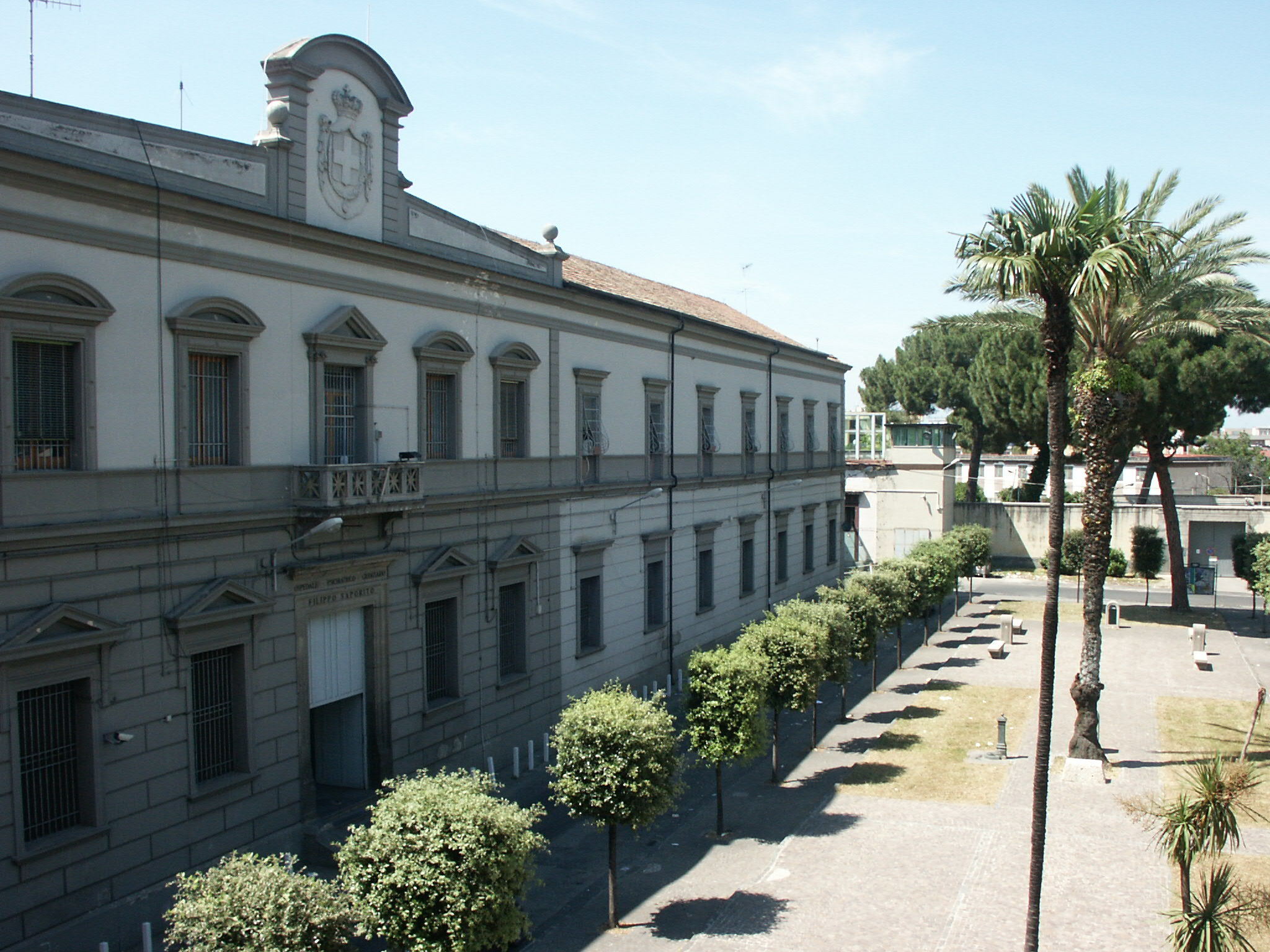 Ospedale Psichiatrico Filippo Saporito